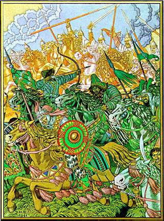 Иллюстрация Ивана Яковлевича Билибина (1876-1942)